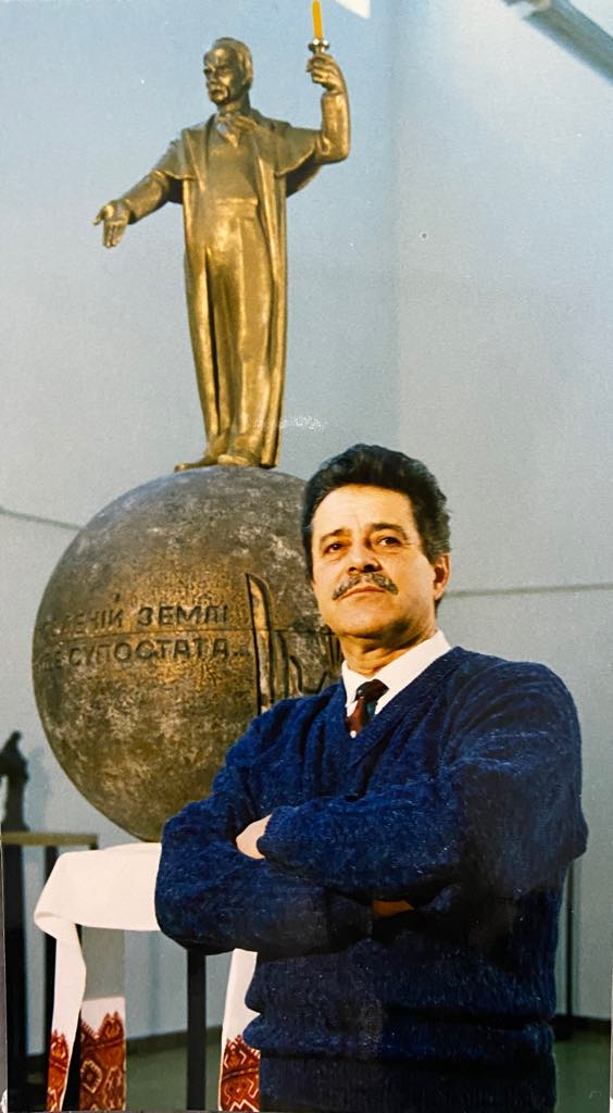 1940 року народження, український скульптор. Професор кафедри монументально-декоративної скульптури Львівської Національної Академії мистецтв.